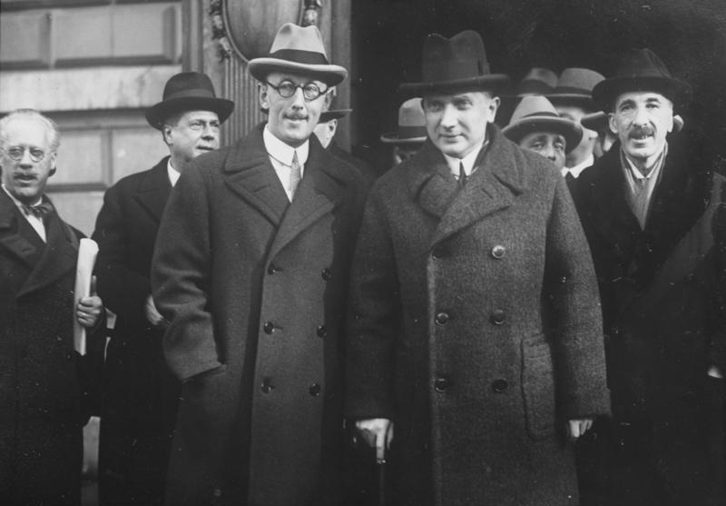 Die ersten Aufnahmen der Völkerbunds-Verhandlungen über den Polen-Conflikt in Genf! Der polnische Aussenminister Zaleski (Mitte) verlässt das Völkerbund-Palais in Genf nach der ersten Sitzung.